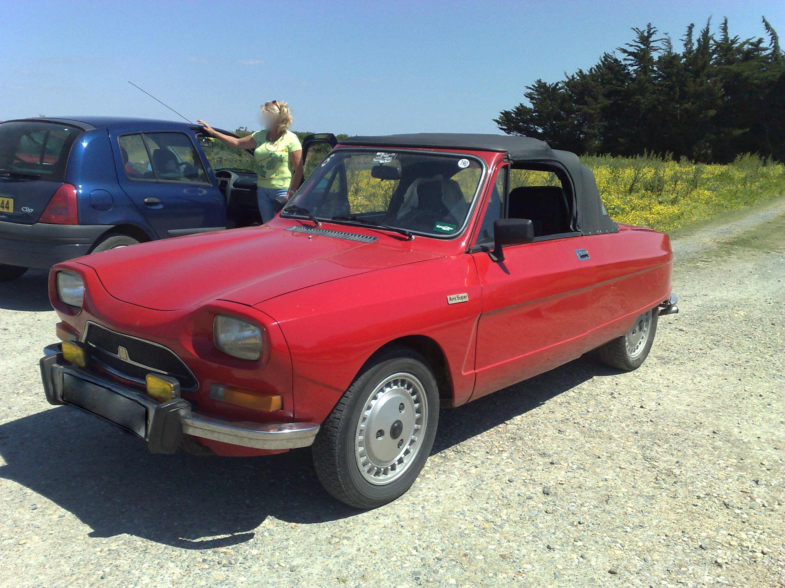 Un des deux seuls modèles existants d'Ami Super XC. Cet exemplaire est une réalisation artisanale réalisée par Roger Plet.